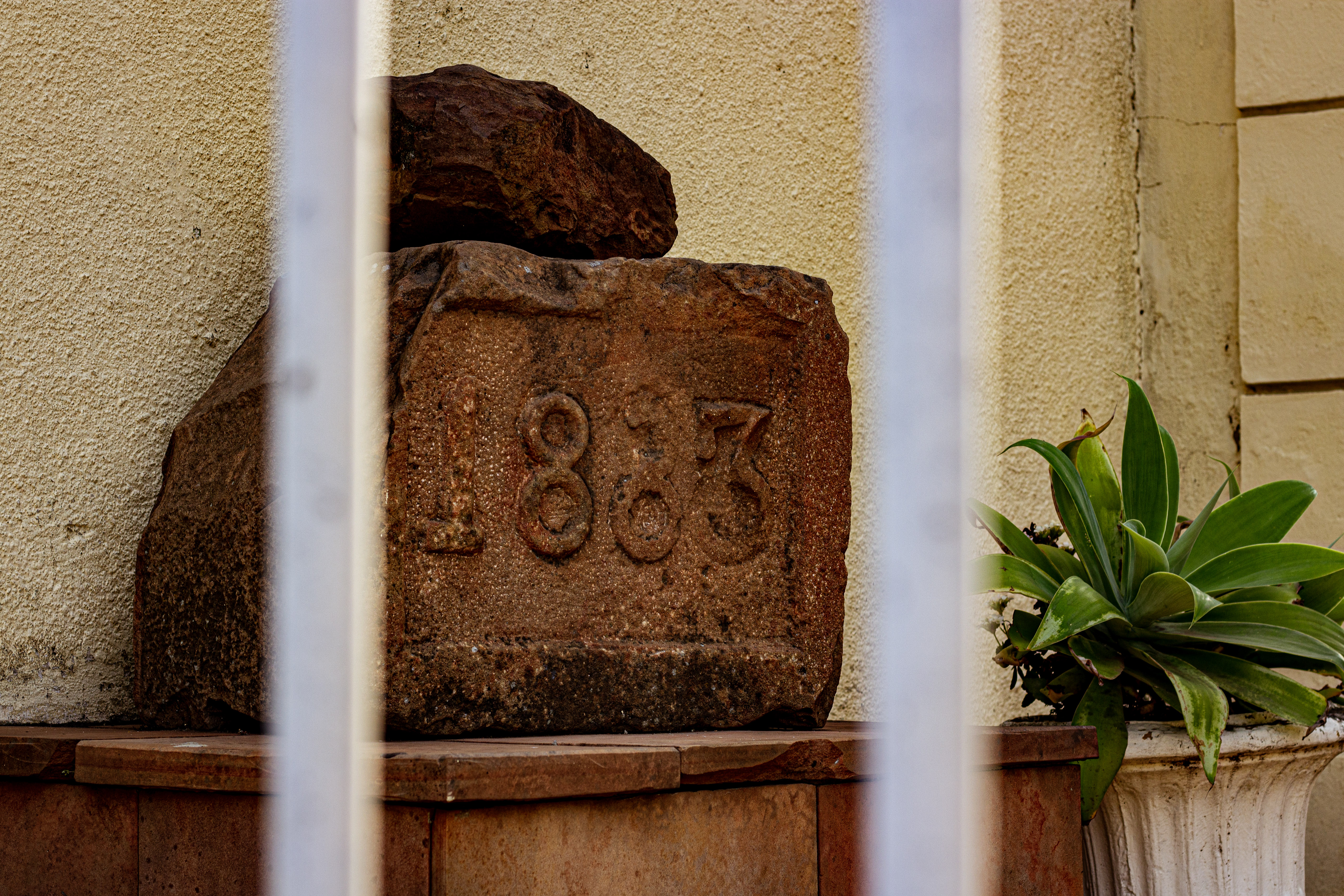 Cultural propertyTeatro Prezewodowski, Itaqui, Rio Grande do Sul, Brazil Q3527536, P727: iPatrimônio ID: itaqui-teatro-prezewodowski